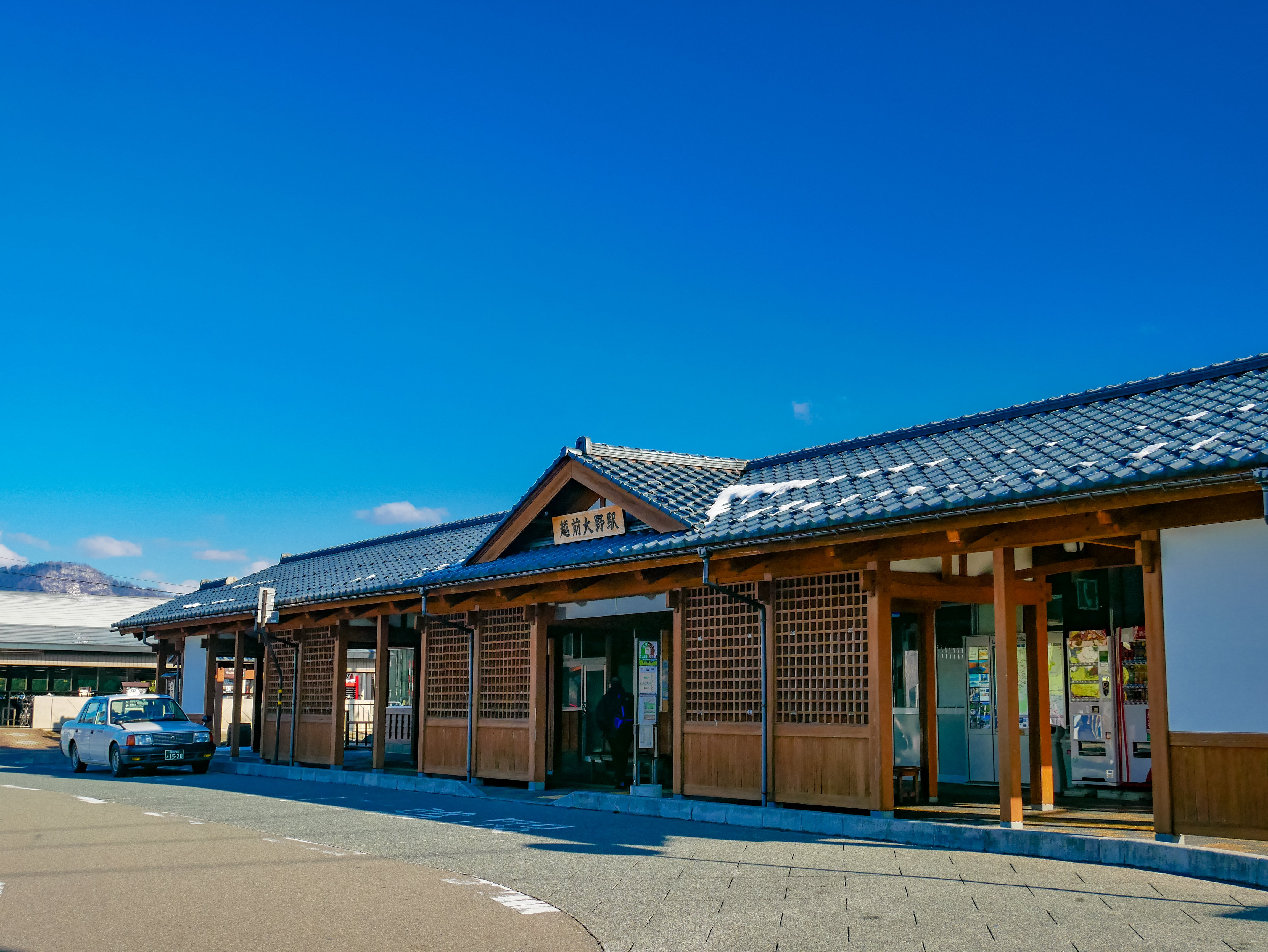 福井県大野市、越前大野駅、越美北線